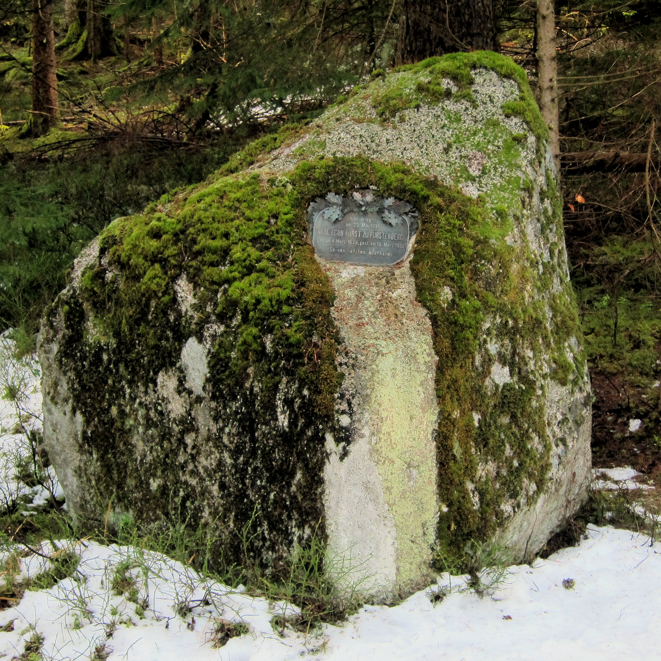 "Hahnenstein"-Denkmal bei Schluchsee (Schwarzwald) zum Gedenken an Karl Egon Fürst zu Fürstenberg, der an dieser Stelle am 23. Mai 1891 seinen letzten Auerhahn erlegte